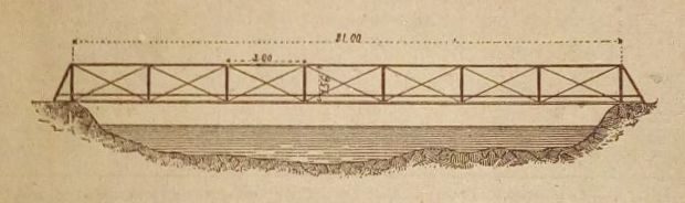 Catalogue illustré des ponts portatifs économiques applicables au service des chemins vicinaux et ruraux - Decauville Aine - Octobre 1885